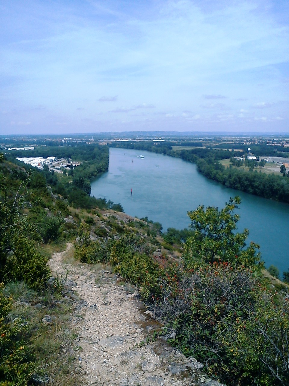 Andance vue générale et détails